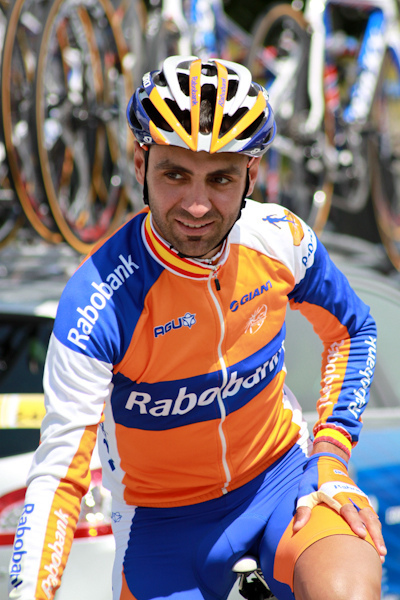 Etape 1 (Albertville) du Critérium du Dauphiné 2011